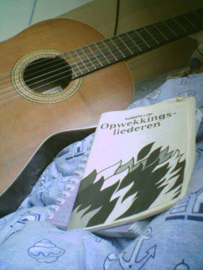 Zojuist een foto gemaakt van opwekkingsbundel, ichthusbundel, gitaar en dekbedhoes. Mijn interieur begint al aardig bekend te worden op wikipedia, met al die foto's... :-) Categorie:Christelijke muziek